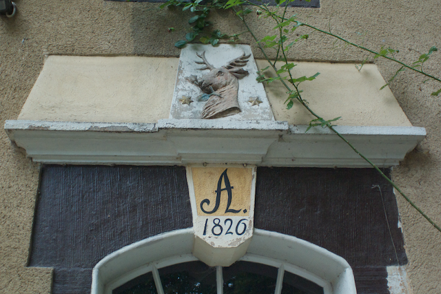 Verzierungen über dem Haupteingang des Hauptgebäudes, Grundmuehle (Radeberg), Deutschland, Sachsen